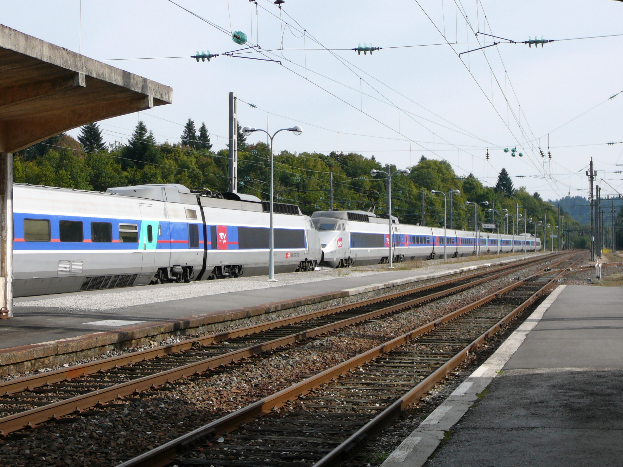 Vue direction Frasne, passage du TGV Paris-Berne/Lausanne